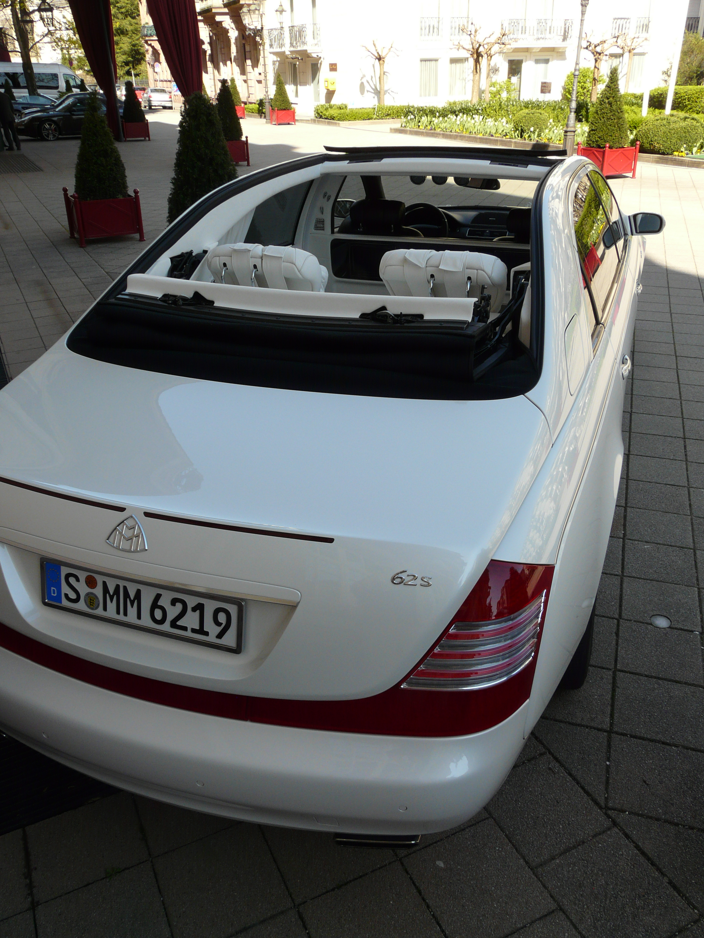 Bildinhalt: Maybach 62 S Landaulet vor dem Brenners, von hinten Aufnahmeort: Baden-Baden, Deutschland